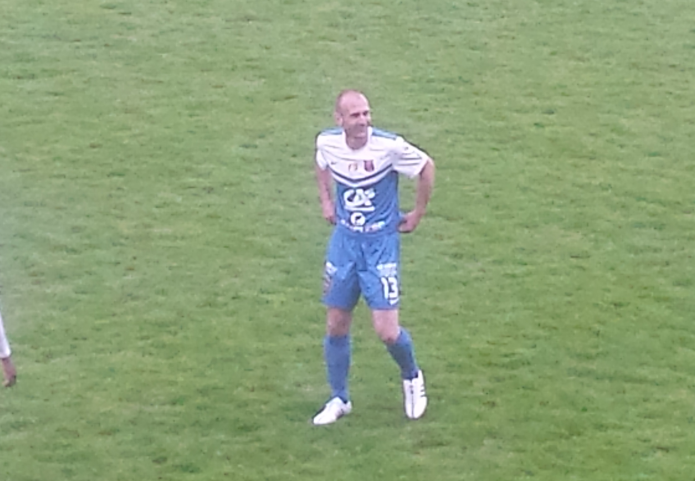 Ludovic Delporte lors du match Arras / Romorantin, le 25 avril 2015, au Stade Degouve-Brabant d'Arras, comptant pour la vingt-sixième journée du championnat de France amateur de football ou CFA (quatrième division française).